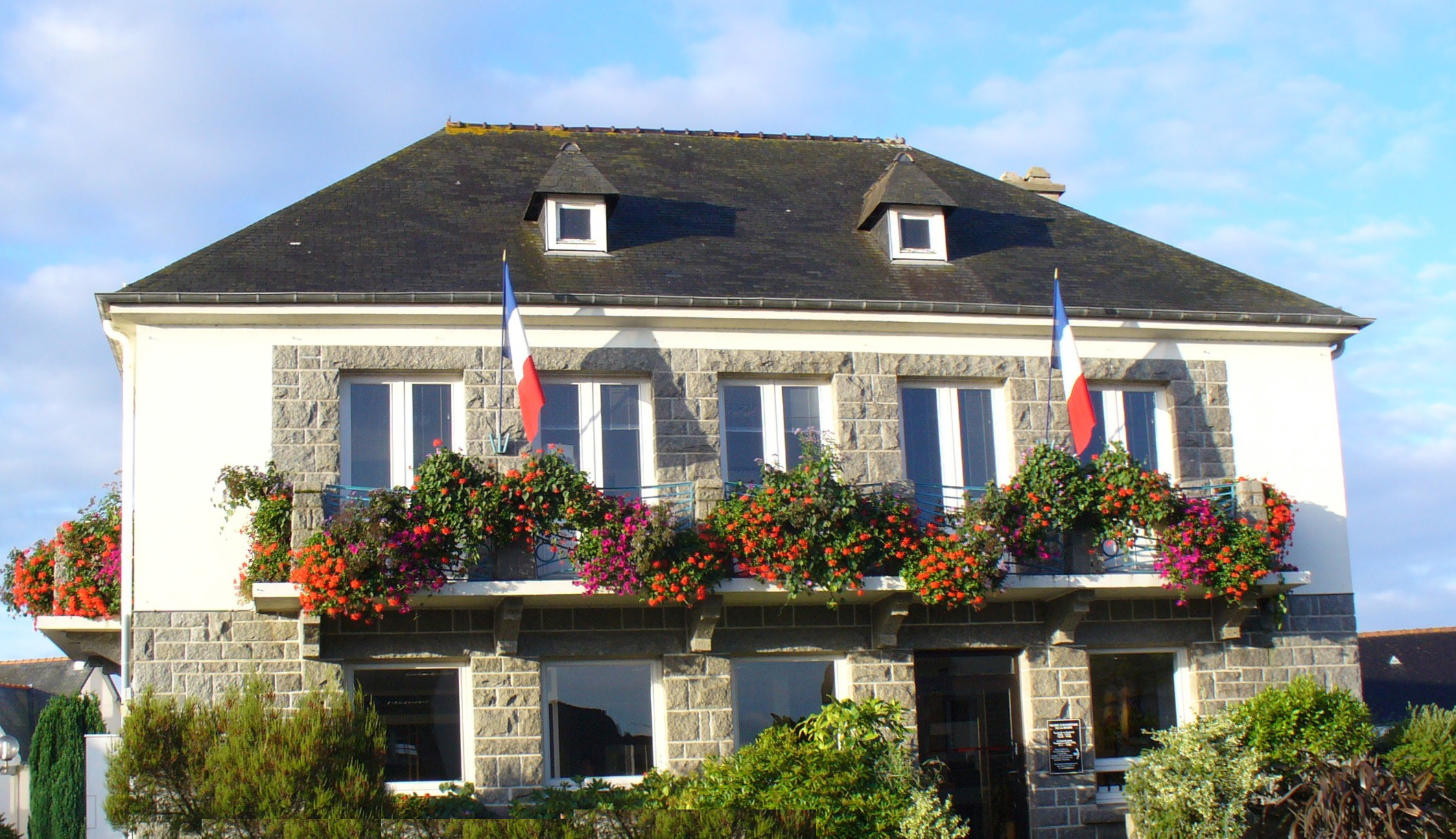 Mairie de Langueux